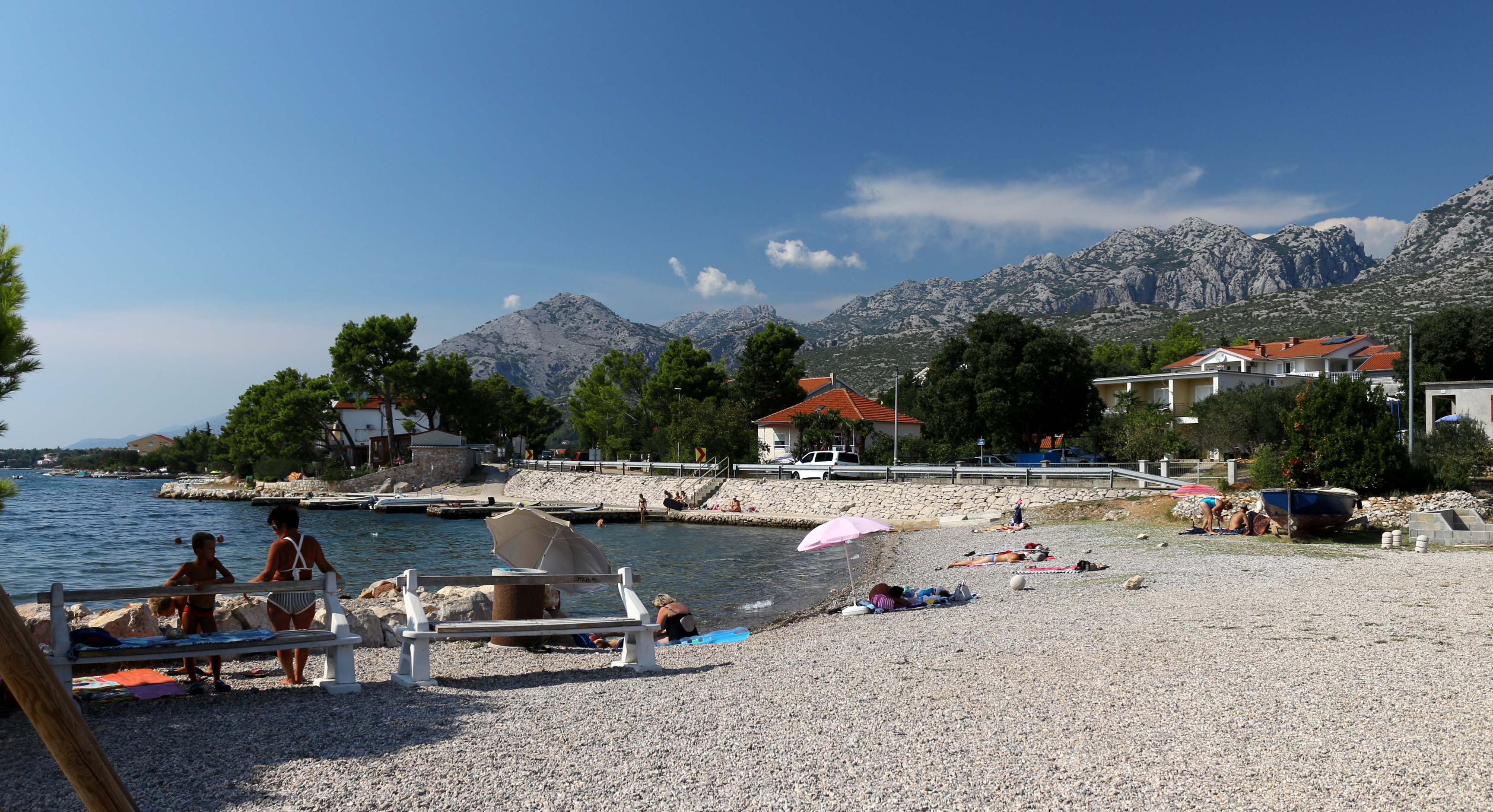 Seline (Starigrad), Zadarská župa, Chorvatsko